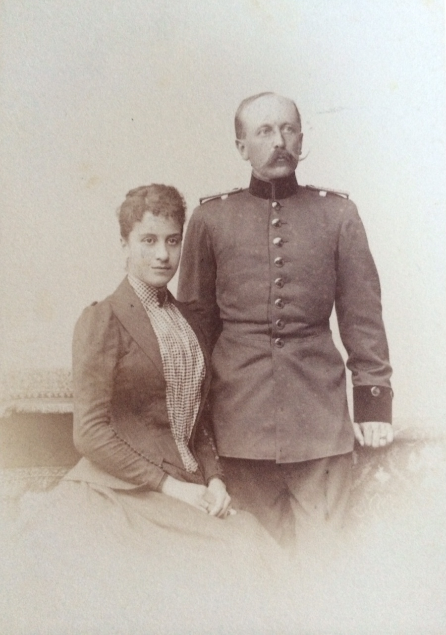 Friedrich Wilhelm Roediger v. Manteuffel mit seiner Ehefrau Wilhelmine, geb. Reinboldt